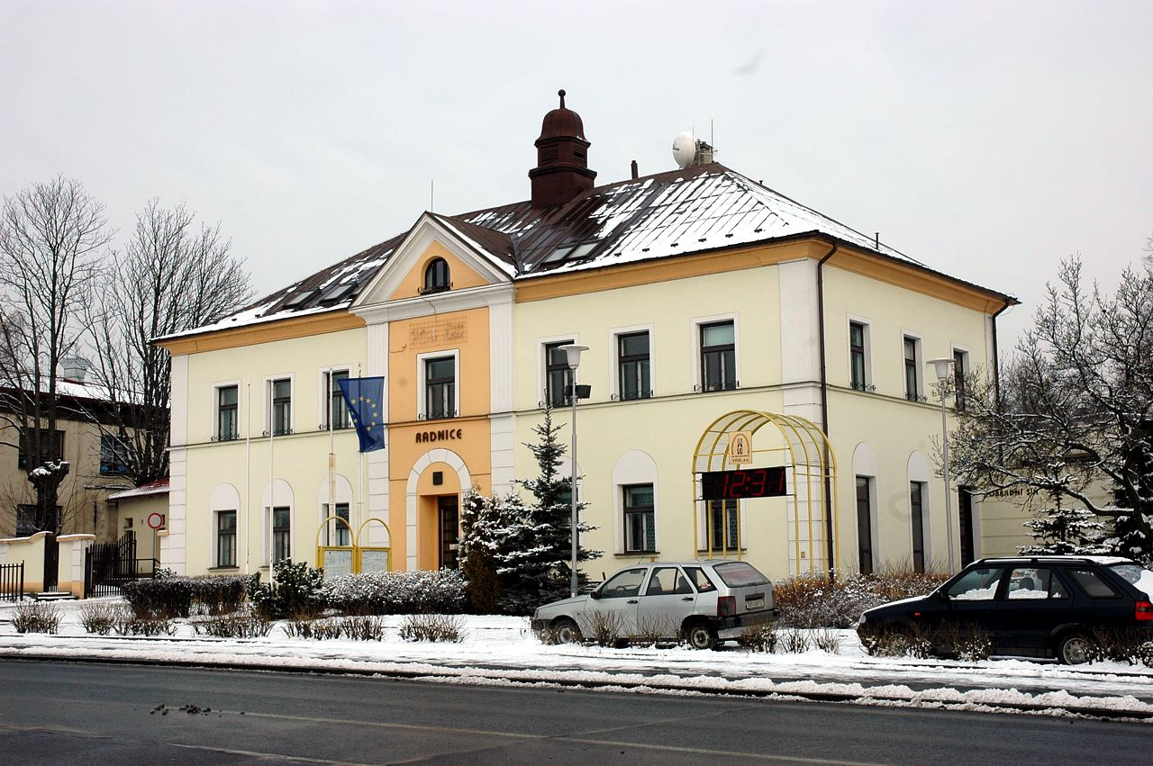 Radnice Ostrava-Radvanice a Bartovice, Těšínská 87/281, Radvanice.